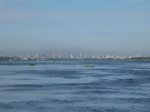 Asunción ac Afon Paraguay.